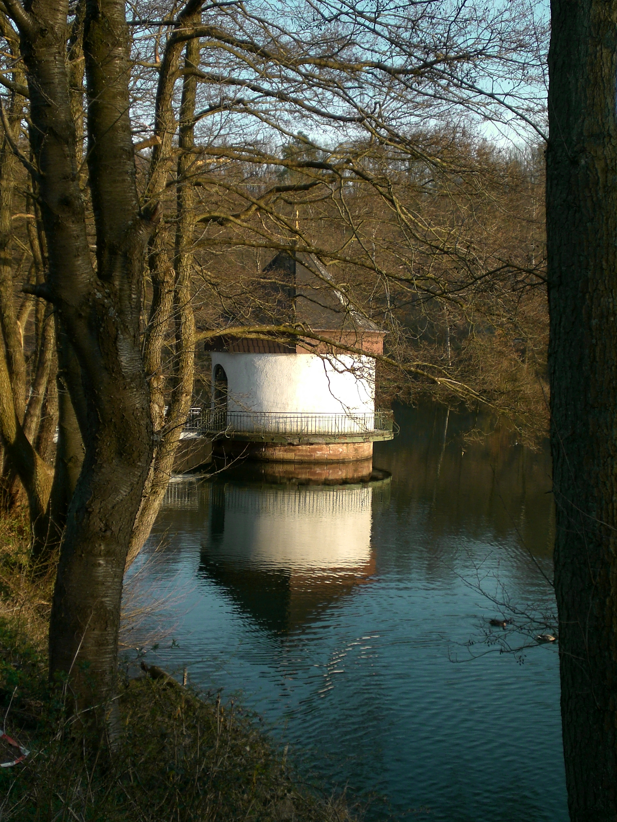 Schleusenhaus am Itzenplitzer Weiher Gemeinde Schiffweiler